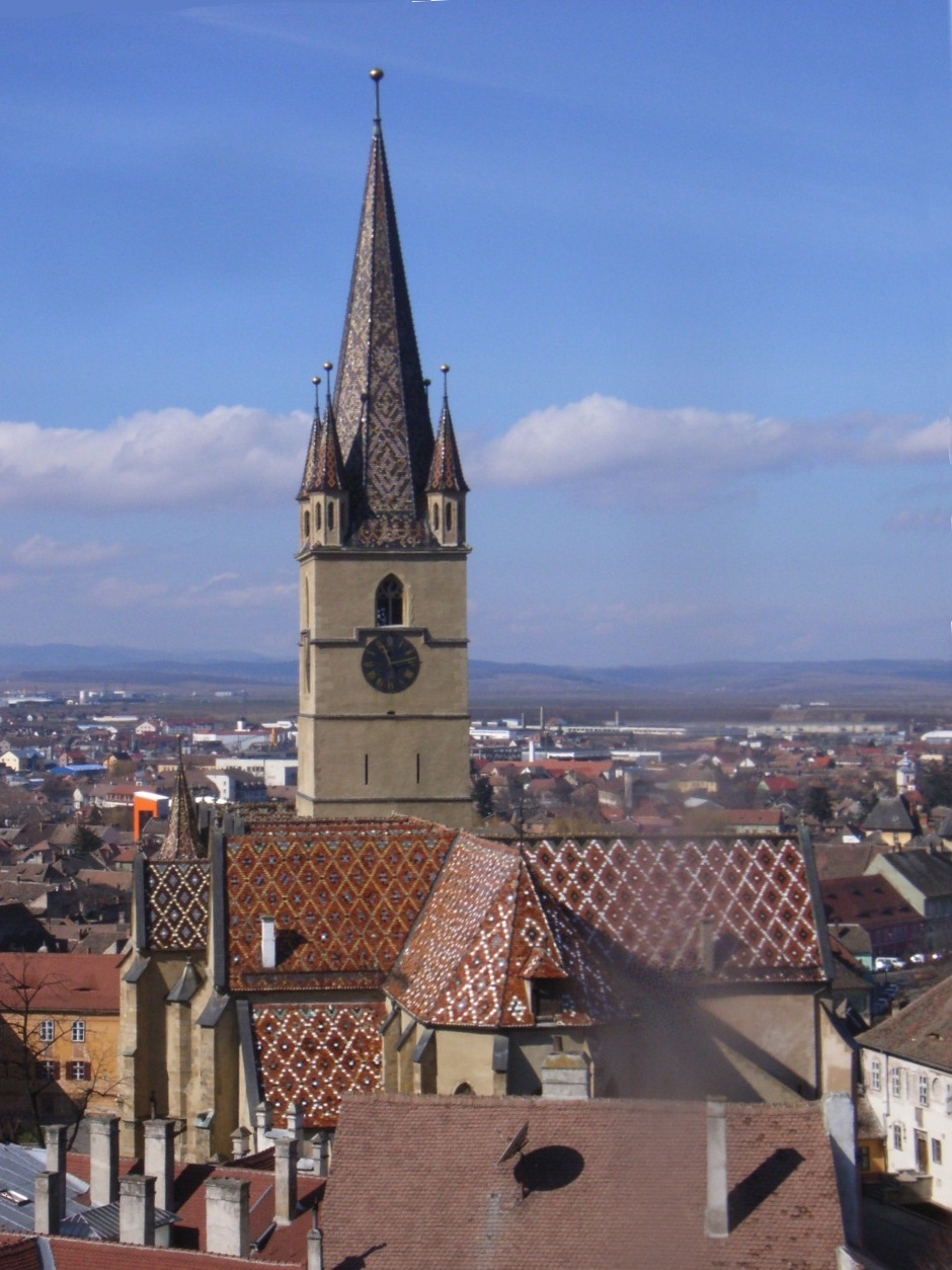 Evangelische Stadtpfarrkirche von Sibiu-Hermannstadt, vom Ratsturm aus gesehen.